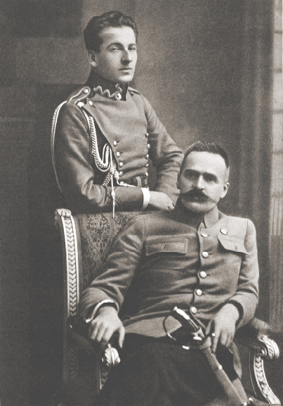 Komendant Józef Piłsudski z por. Bolesławem Wieniawą-Długoszowskim.